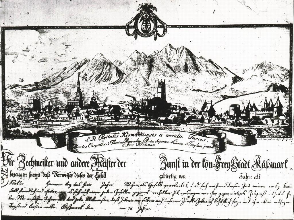 Starý Kežmarok - Mesto a Vysoké Tatry na listine